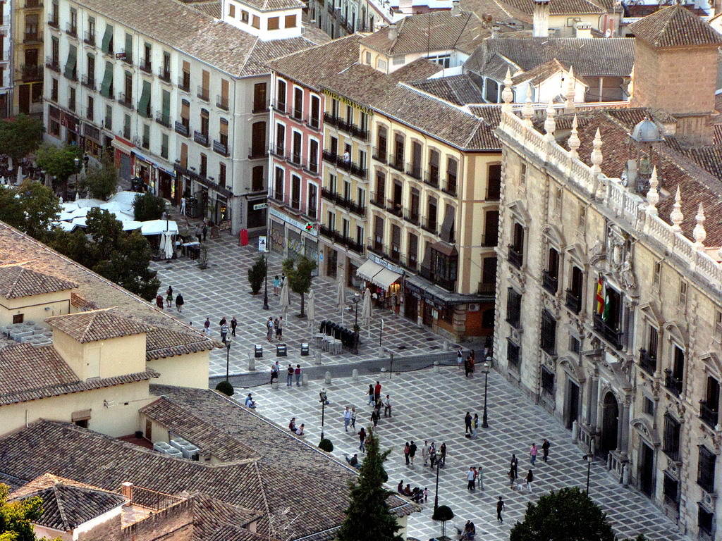 Plaza Nueva de Granada, vista desde la Alhambra